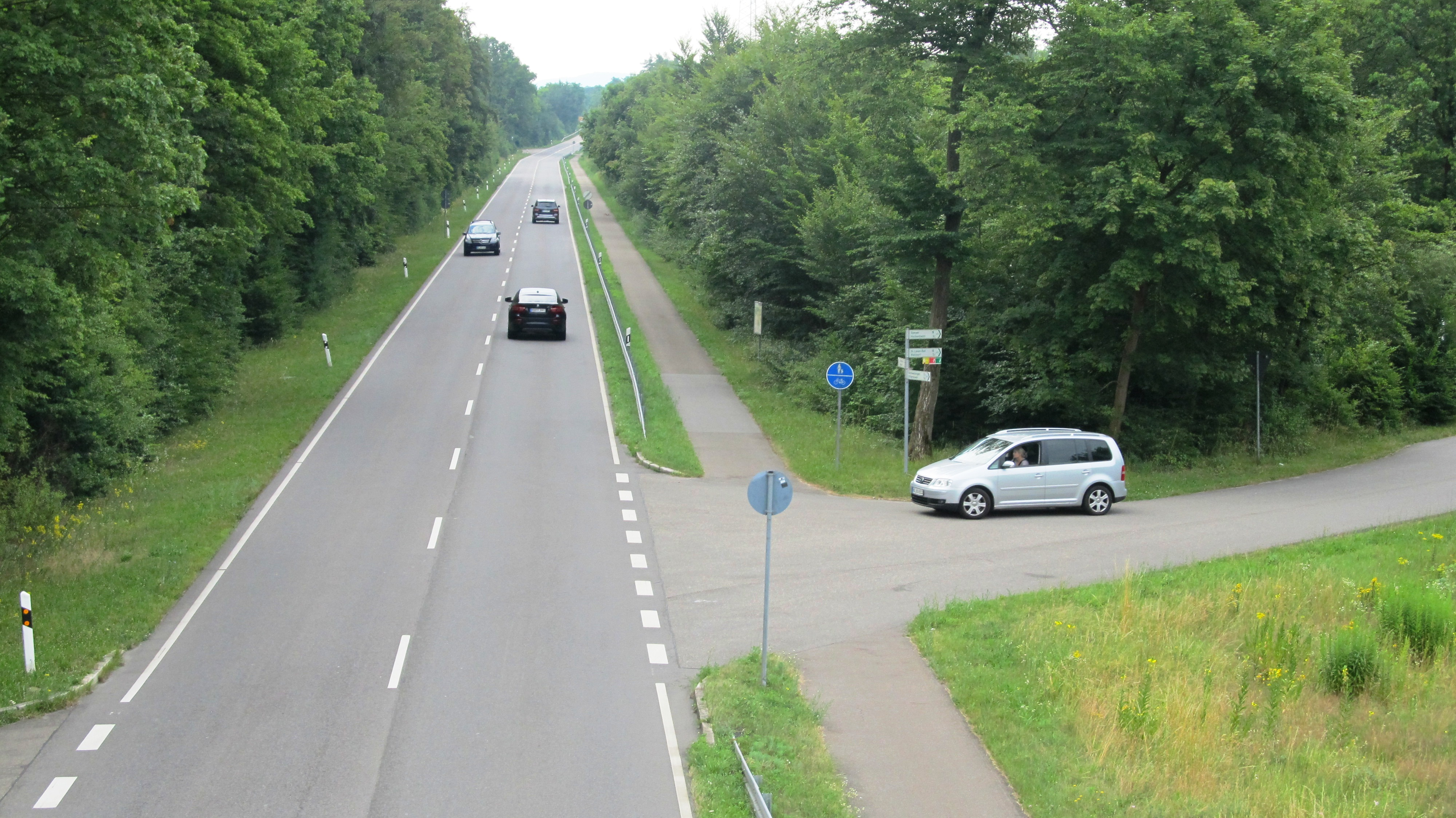 Schwetzinger Hardt, Blick auf die B 291